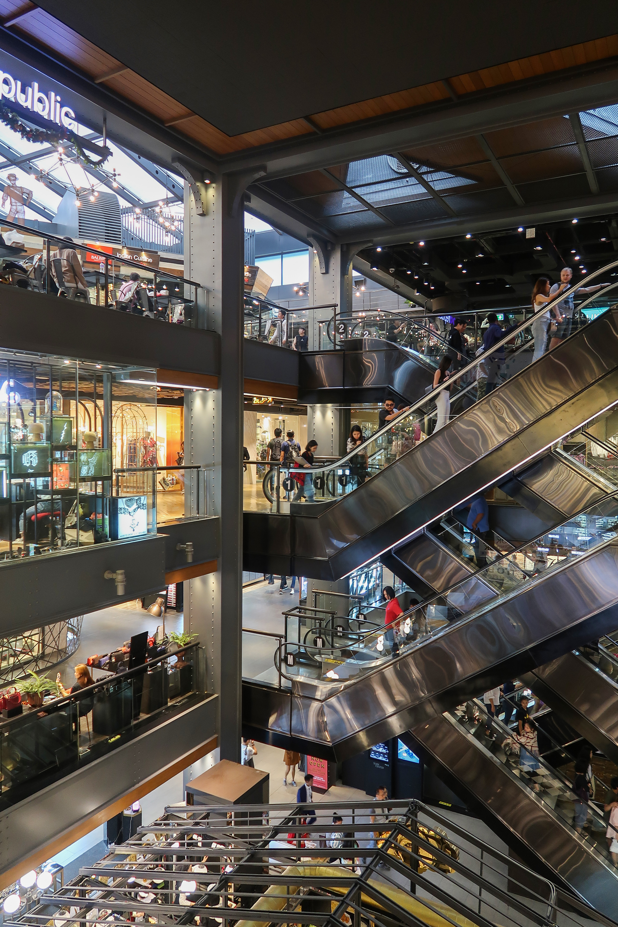 Siam Center Void